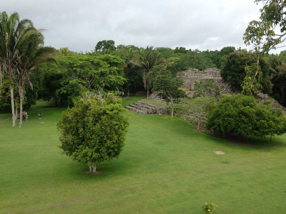 Zona arqueológica de Kohunlich, Quintana Roo, México